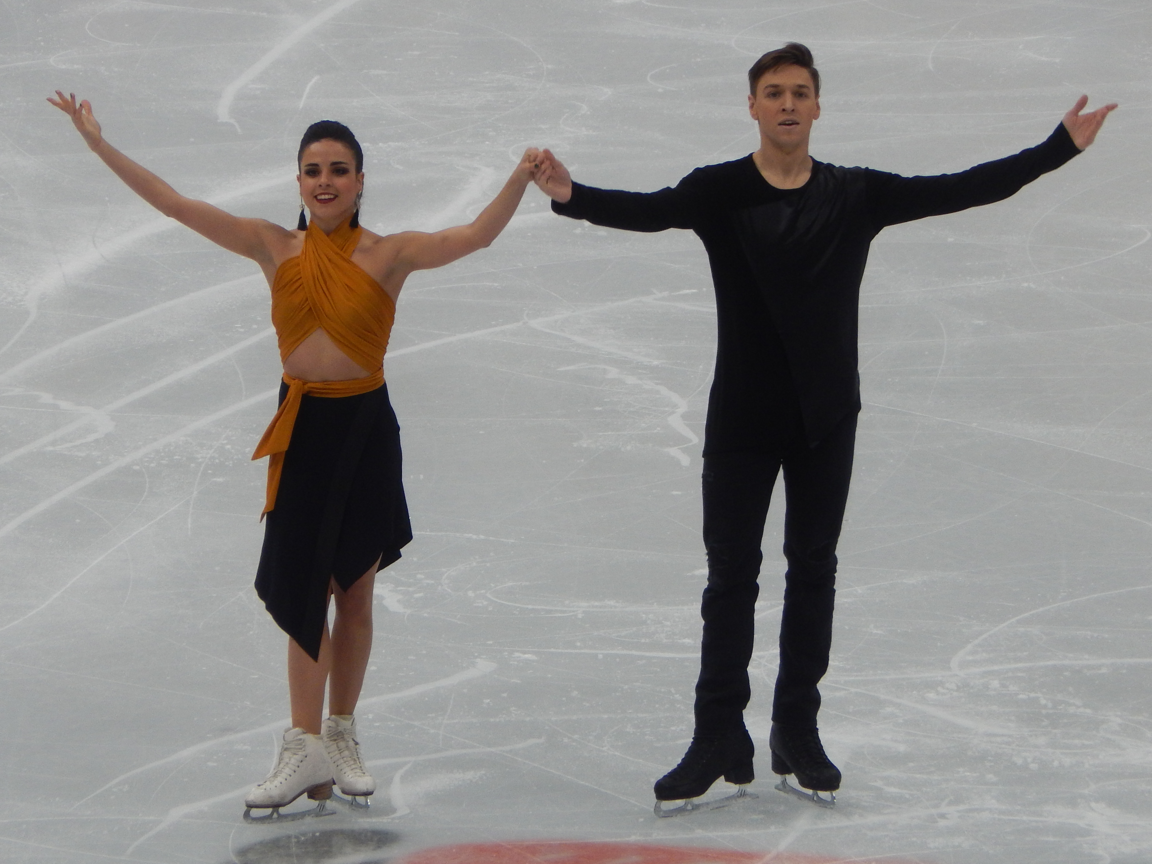 Чемпионат Европы по фигурному катанию 2018 в Москве. Третий день соревнований (19 января). Танцевальная пара из Испании Сара Уртадо и Кирилл Халявин